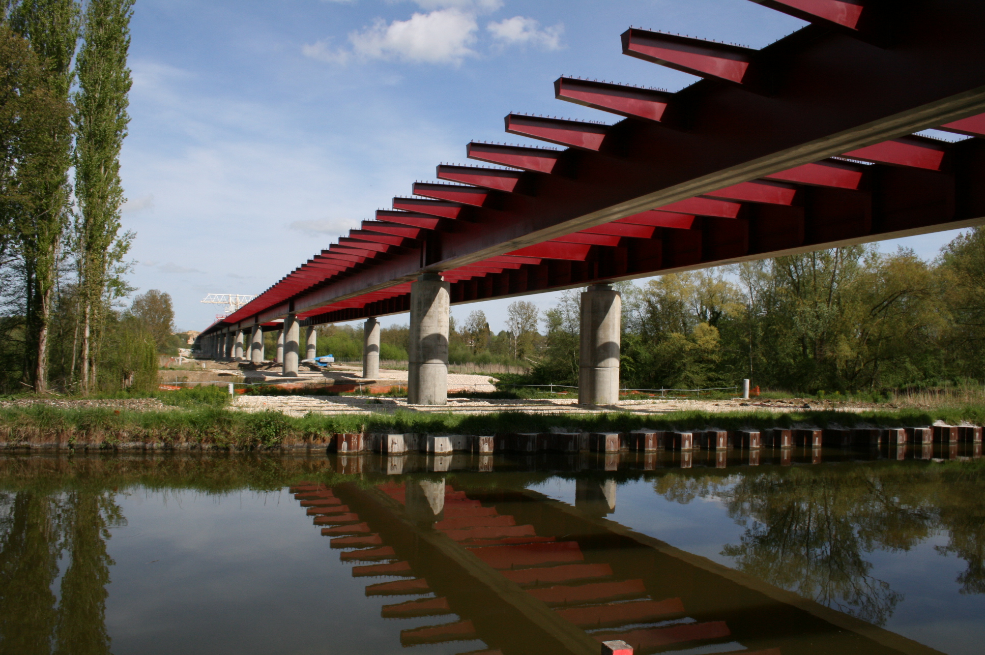 Viaduc du Loing - En construction - supportant l'autoroute A19, il franchit le Loing - département du Loiret - France